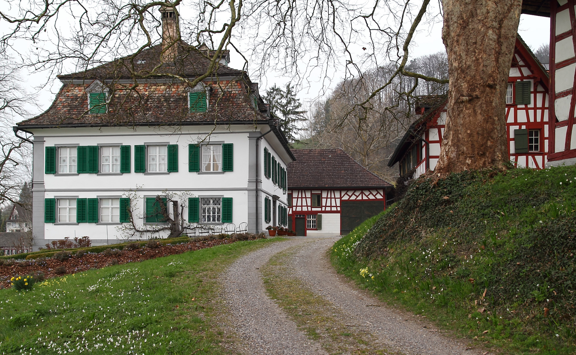 Schloss Bachtobel mit Trotte